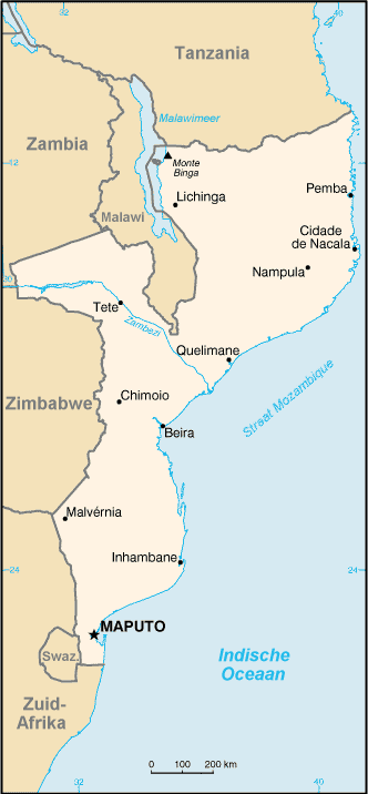 cia (van gif naar png)